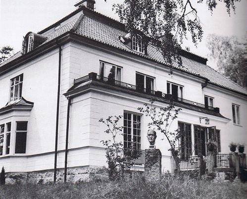 Byst av Per Albin Hansson utan för Bommersvik våren 1947. Byst av Per Albin Hansson som uppfördes för att hedra hans minne.